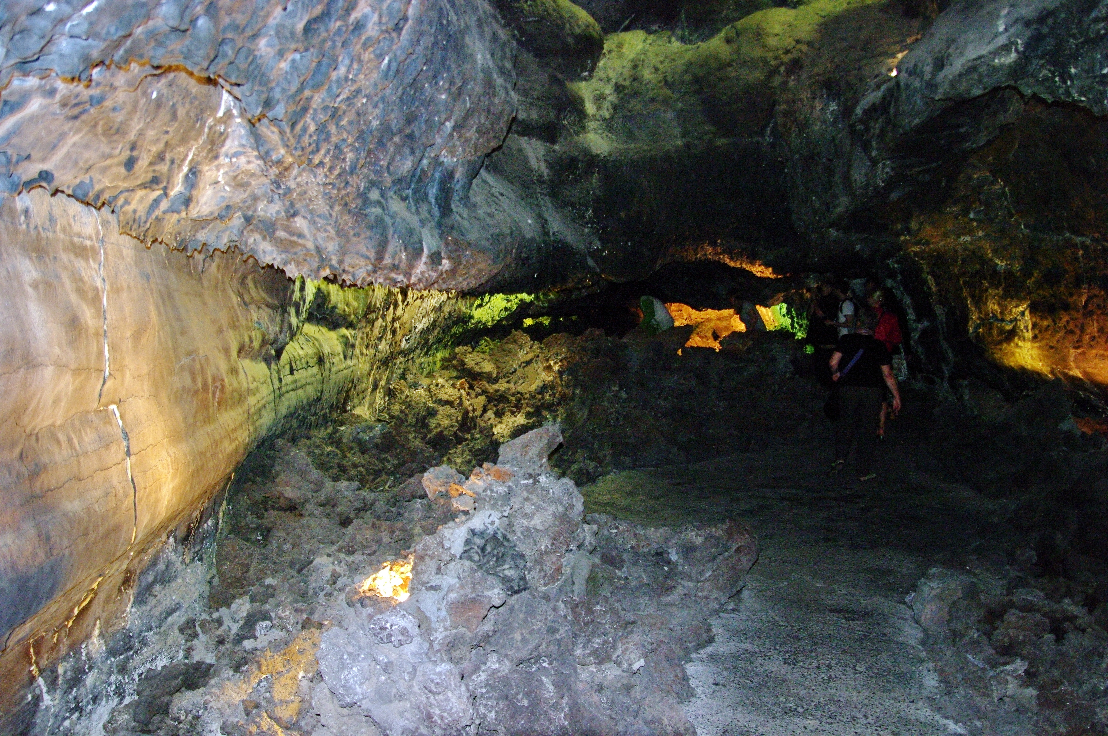 Cueva de los Verdes